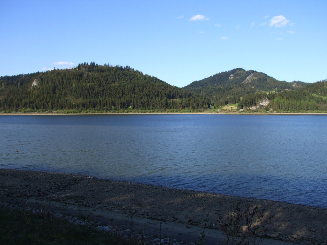 Od lewej: Upszar i Flaki w Pieninach nad Jeziorem Sromowskim. Nad samym jeziorem niewielka skała to Popieska